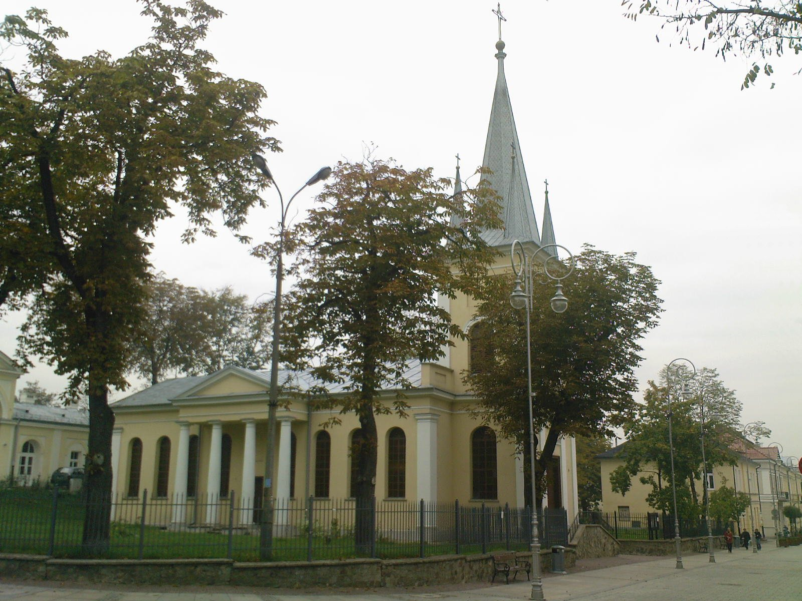 Kościół ewangelicki św. Piotra i Pawła w Kielcach